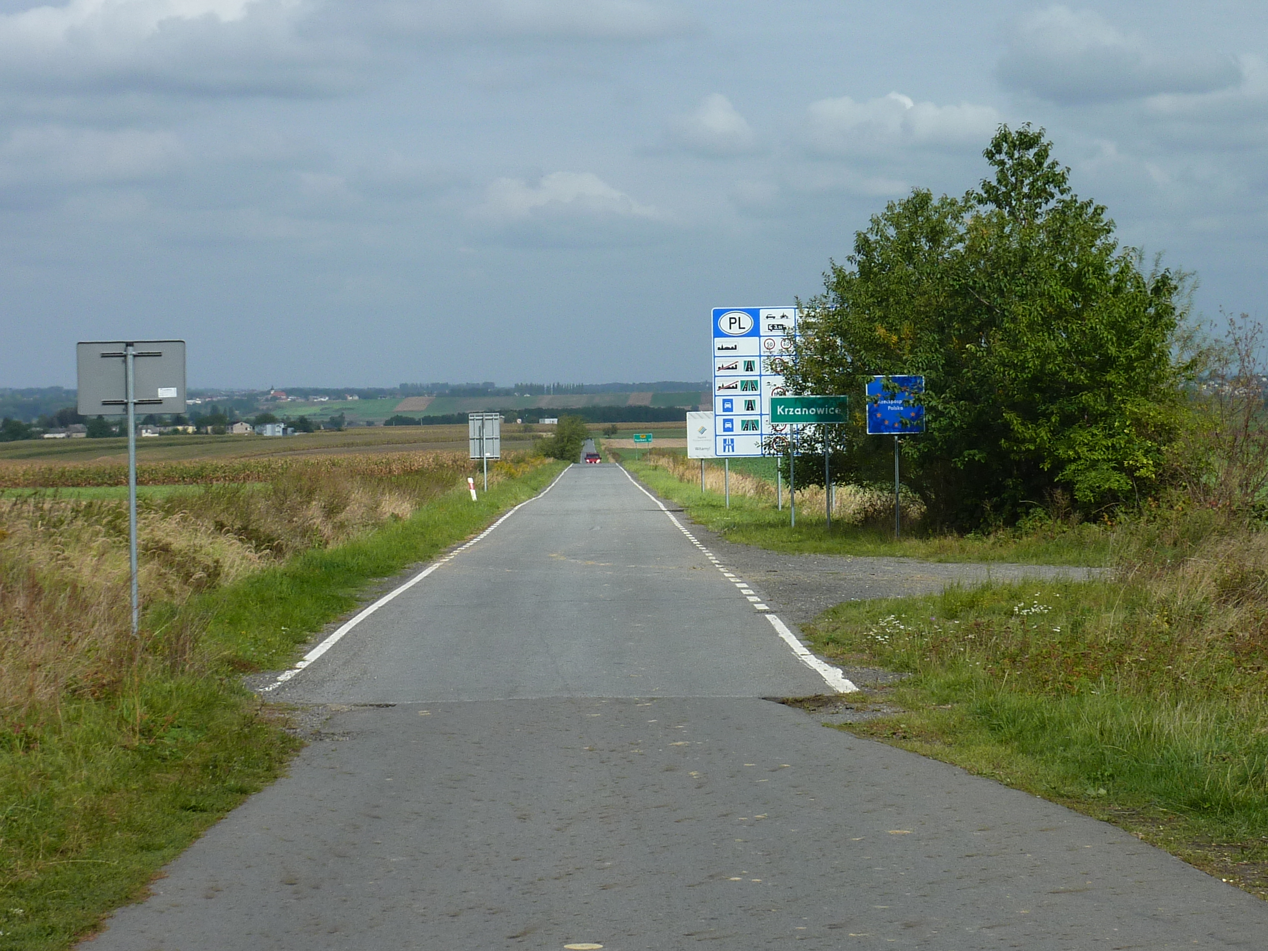 Chuchelná, hraniční přechod do Polska